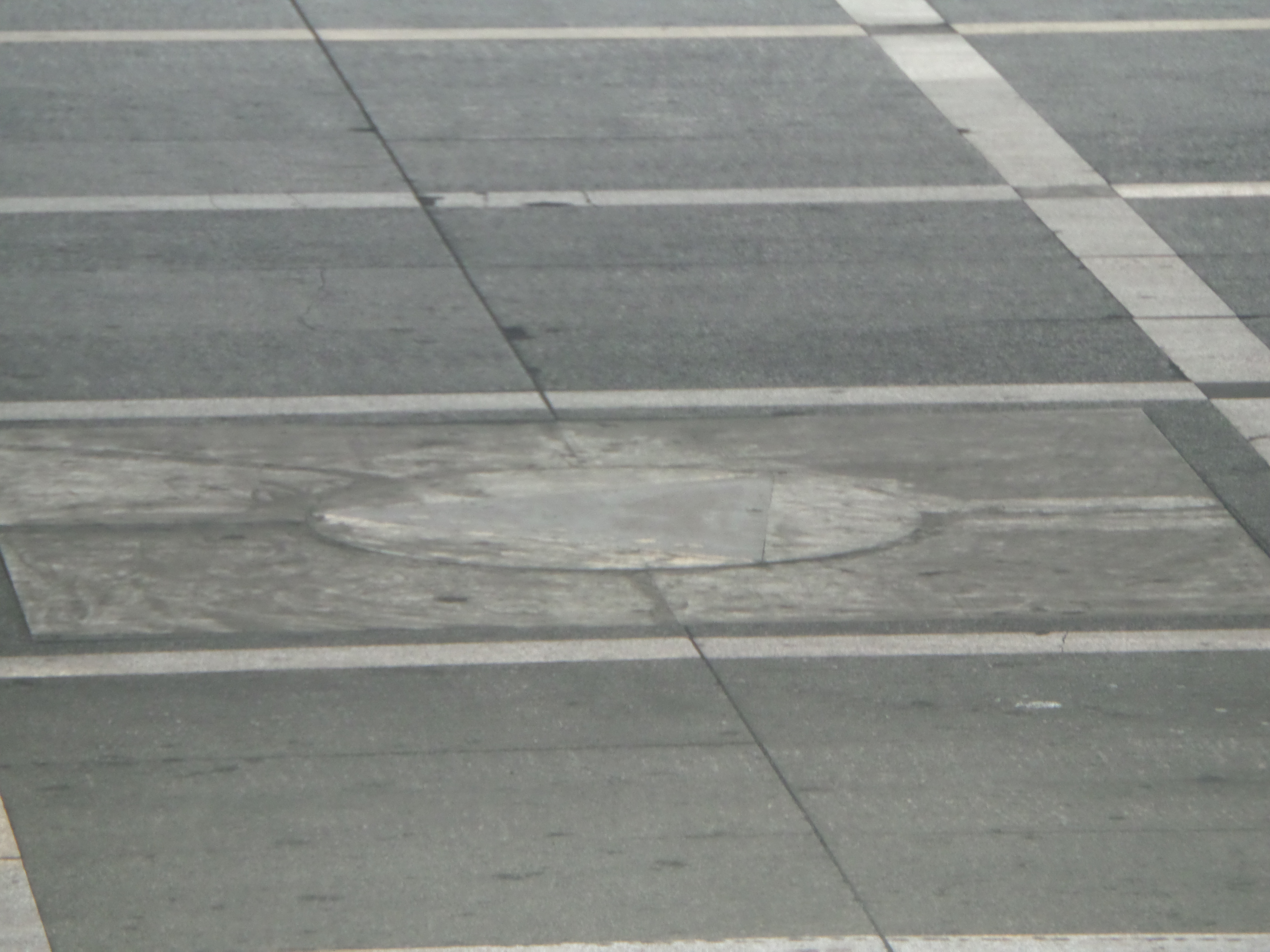 하얼빈역 1번 플렛폼에서 안중근 의사가 이토 히로부미를 저격한 곳